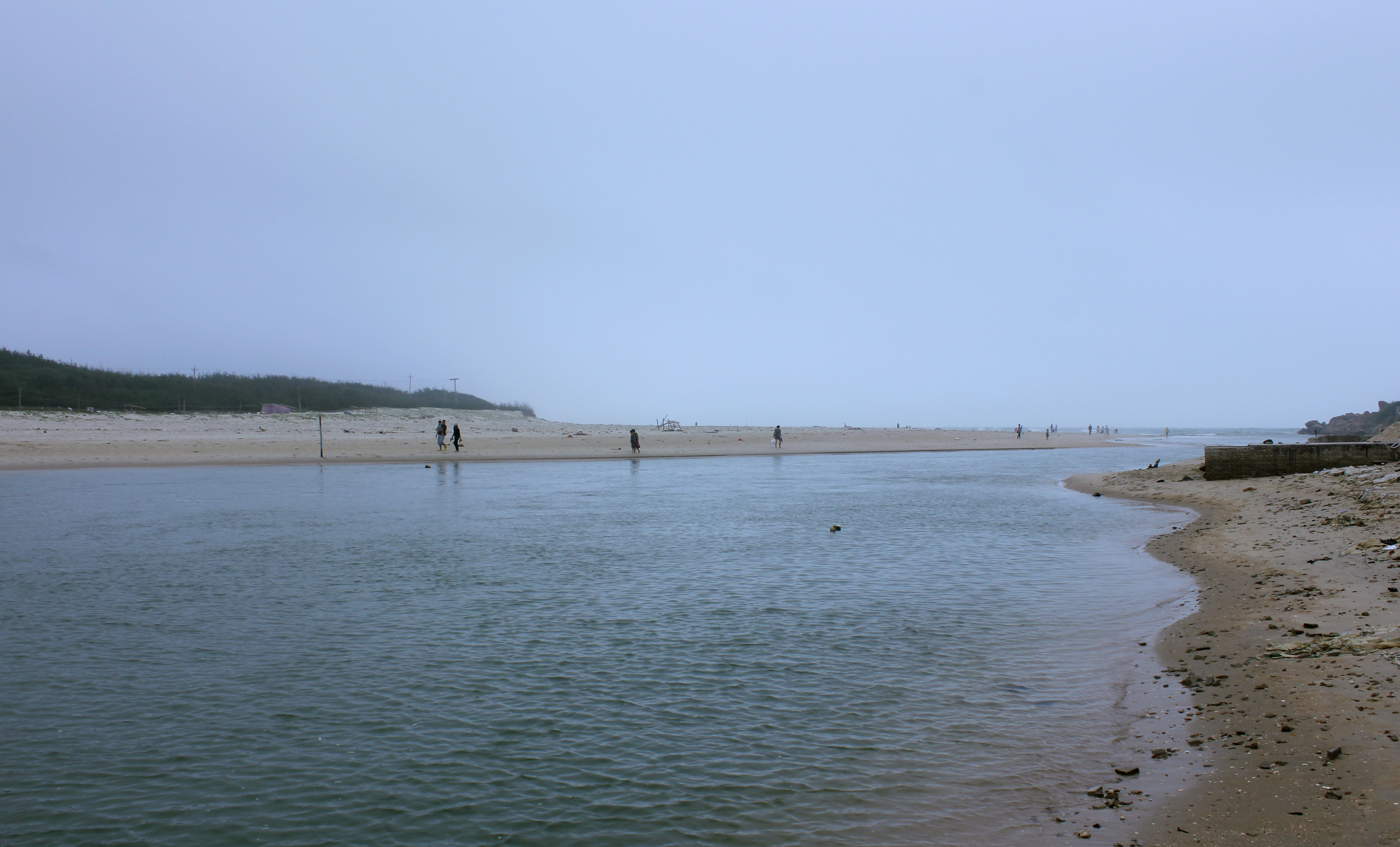 海南省文昌市铜鼓岭以北，宝陵河口，附近被称为月亮湾。